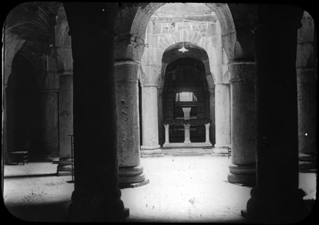 Fonds Trutat - Photographie ancienne Cote : TRU C 2613 Localisation : Fonds ancien (S 30) Original non communicable Titre : Intérieur de la crypte de Saint-Bénigne, Dijon Auteur : Trutat, Eugène Rôle de l’auteur : Photographe Lieu de création : Dijon (Côte-d'Or) Date de création : 1859-1910 [entre] Mesures : : 8,5 x 10 cm Observations : Note manuscrite de Trutat : "Dijon : crypte de Saint-Bénigne ". Mot(s)-clé(s) : -- Intérieur -- Crypte -- Colonne -- Chapiteau -- Arc en plein cintre -- Autel -- Cathédrale Saint-Bénigne (Dijon) -- Crypte Saint-Bénigne (Dijon) -- Dijon (Côte-d'Or) -- Côte-d'Or (France) -- Bourgogne (France) -- 19e siècle, 2e moitié -- 20e siècle, 1e quart -- 11e siècle Médium : Photographies -- Positifs sur plaque de verre -- Noir et blanc -- Vues d'architecture -- Détourage au papier collé Voir : TRU C 2612 Intérieur de la crypte de Saint-Bénigne, Dijon Bibliothèque de Toulouse. Domaine public